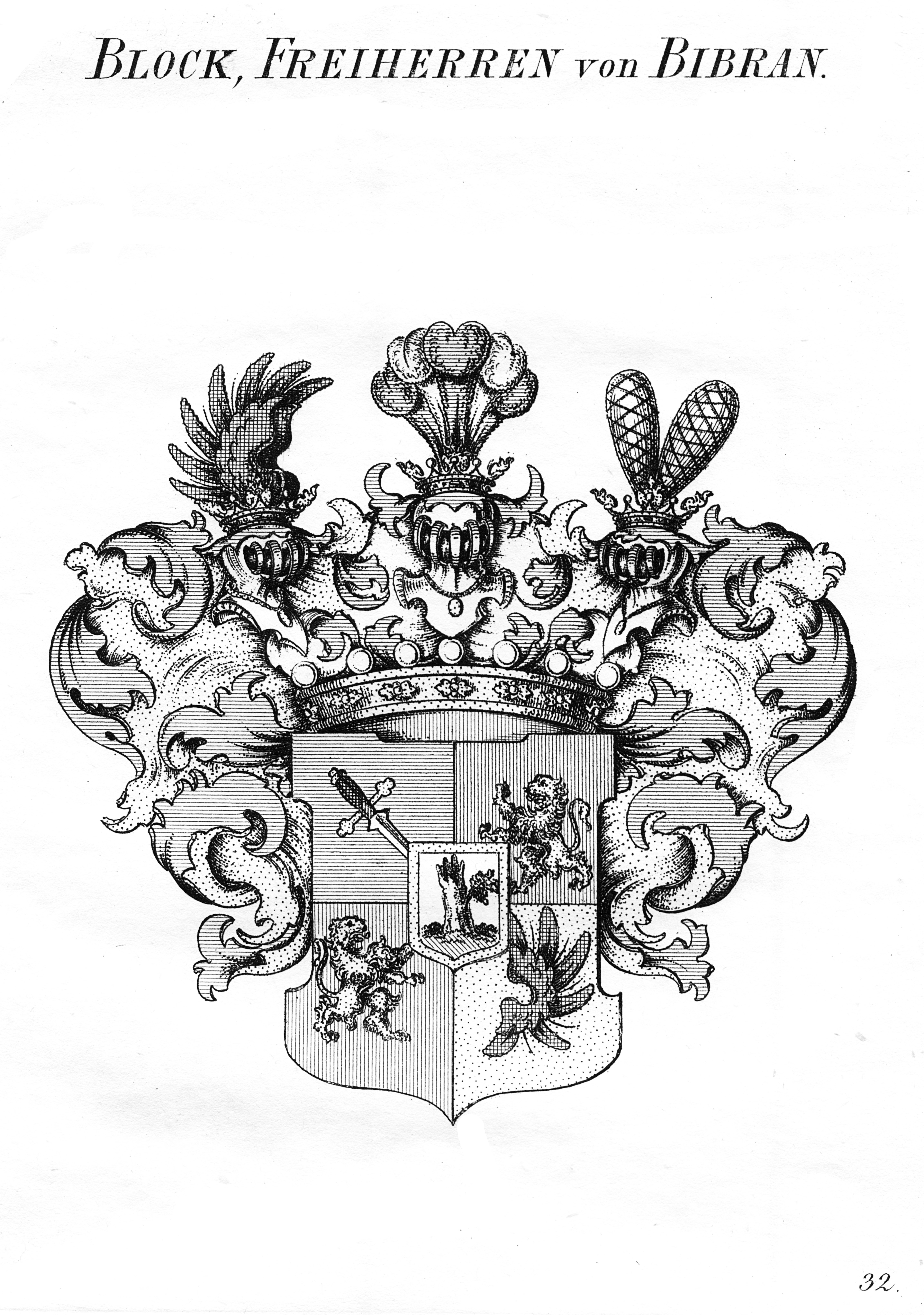 Wappen, Block, von Bibran -. Kupferstich-Wappen von Tyroff. Block, Freiherren von Bibran. Nürnberg, Tyroff, 1847. circa 28,5 x 20 cm (Blatt). 1 Blatt verso weiß. - Kupferstichwappen aus dem Werk "Wappenbuch der Preussischen Monarchie".